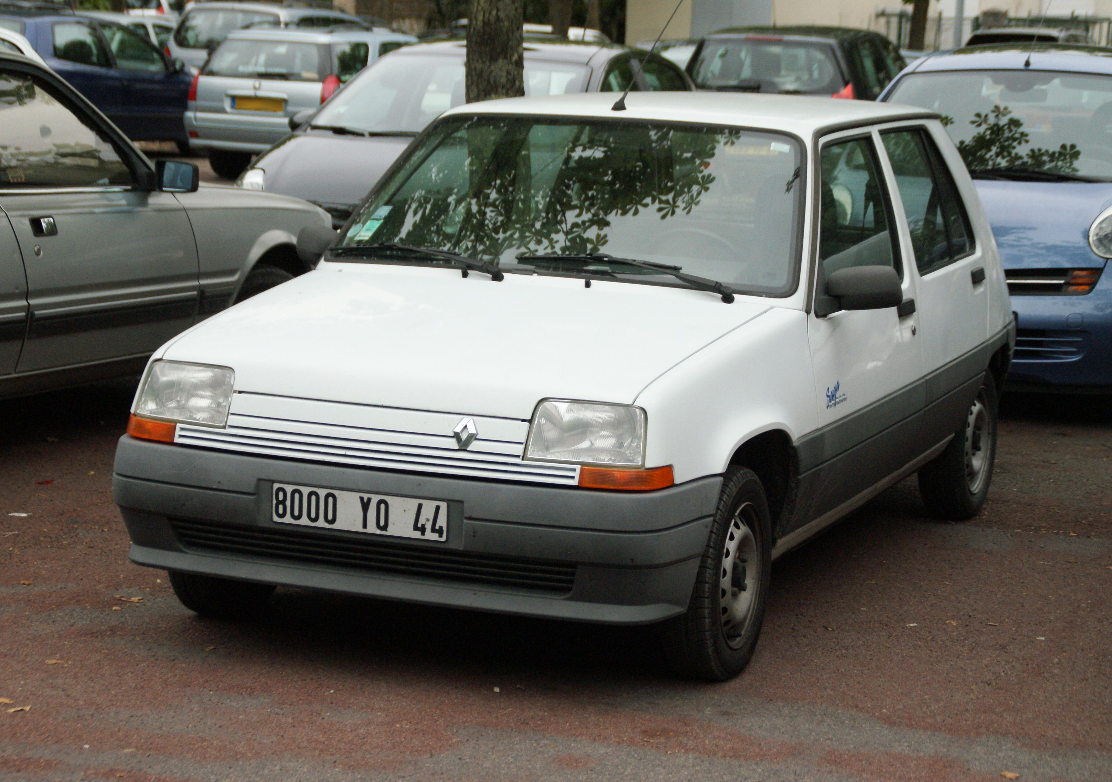 Renault 5 "Saga" five-door